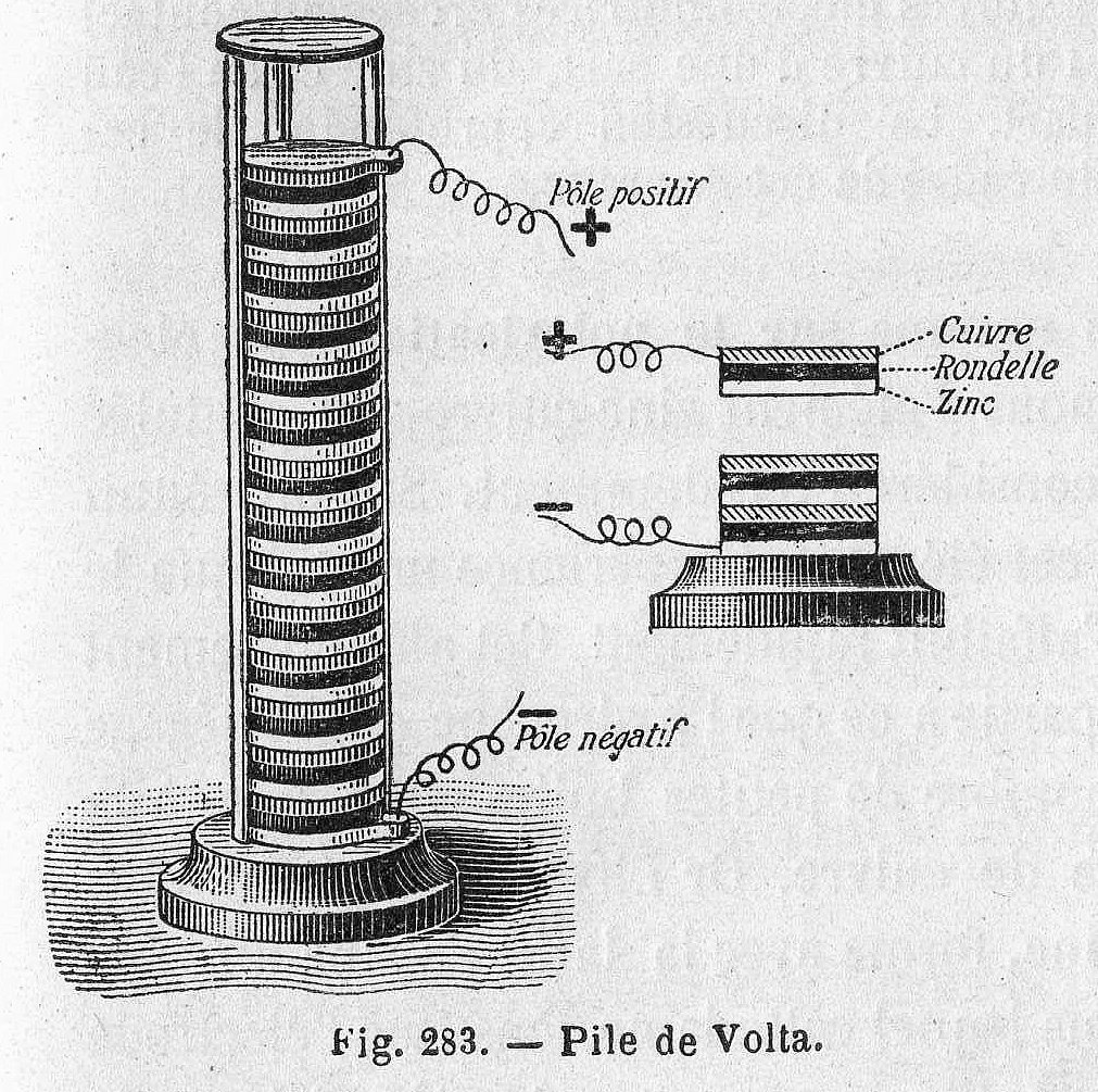 Illustration d'une pile de Volta